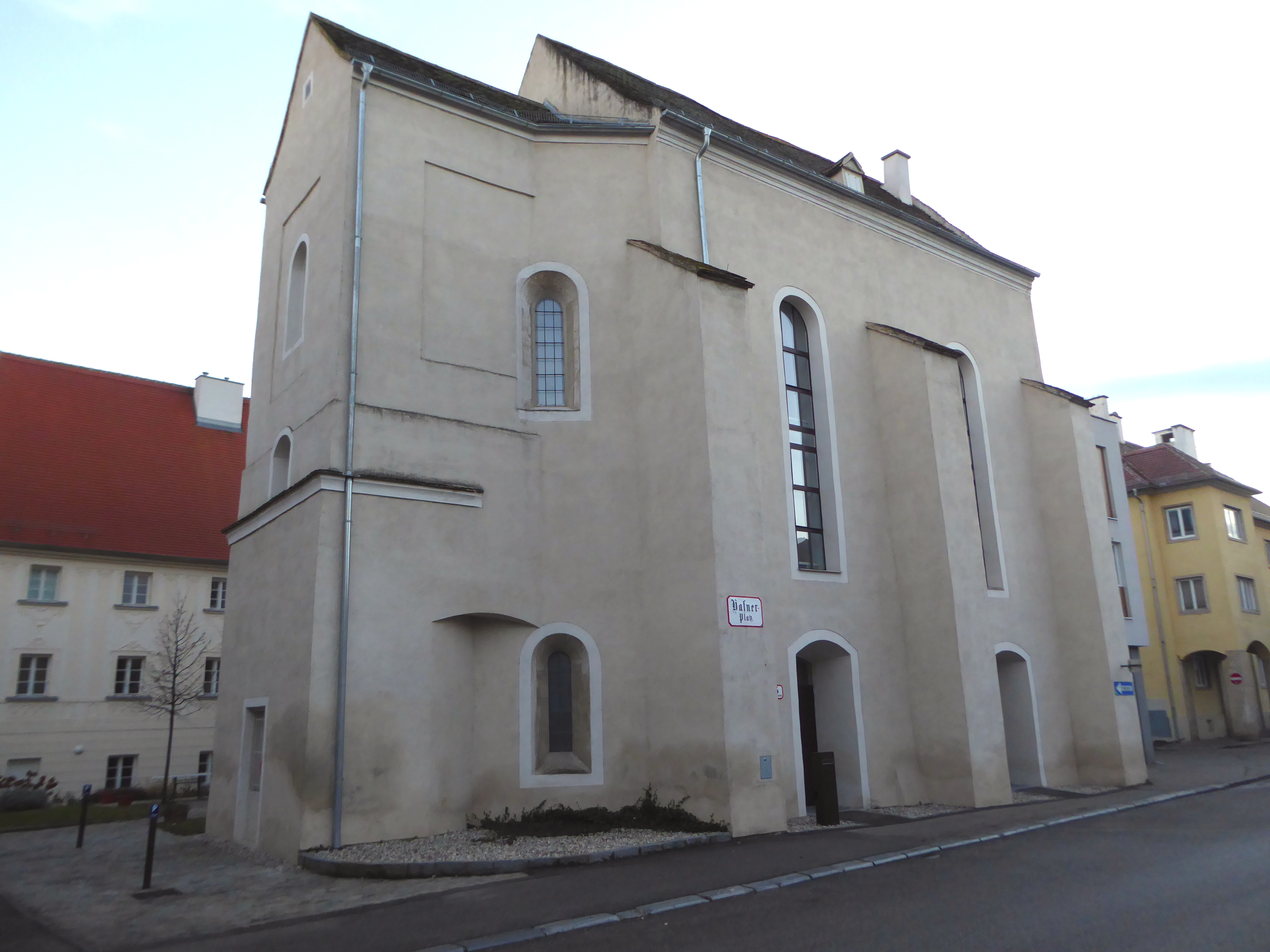 Ehem. Andreaskapelle, Hafnerplatz 5, Krems, Niederösterreich